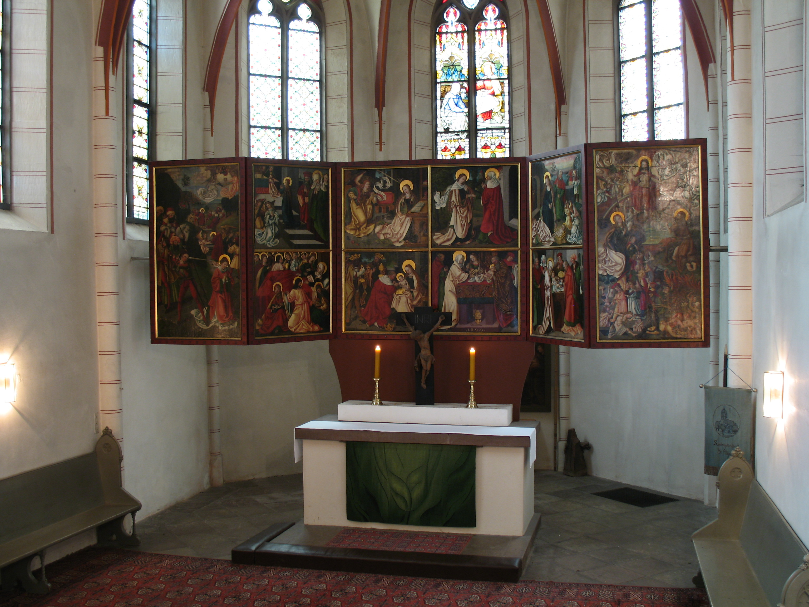 Göttingen, Evangelische St. Albani-Kirche, Altar mit Tafeln von Hans von Geismar, datiert 1499 (Angaben lt. Dehio, Band Bremen/Niedersachsen, München 1992)